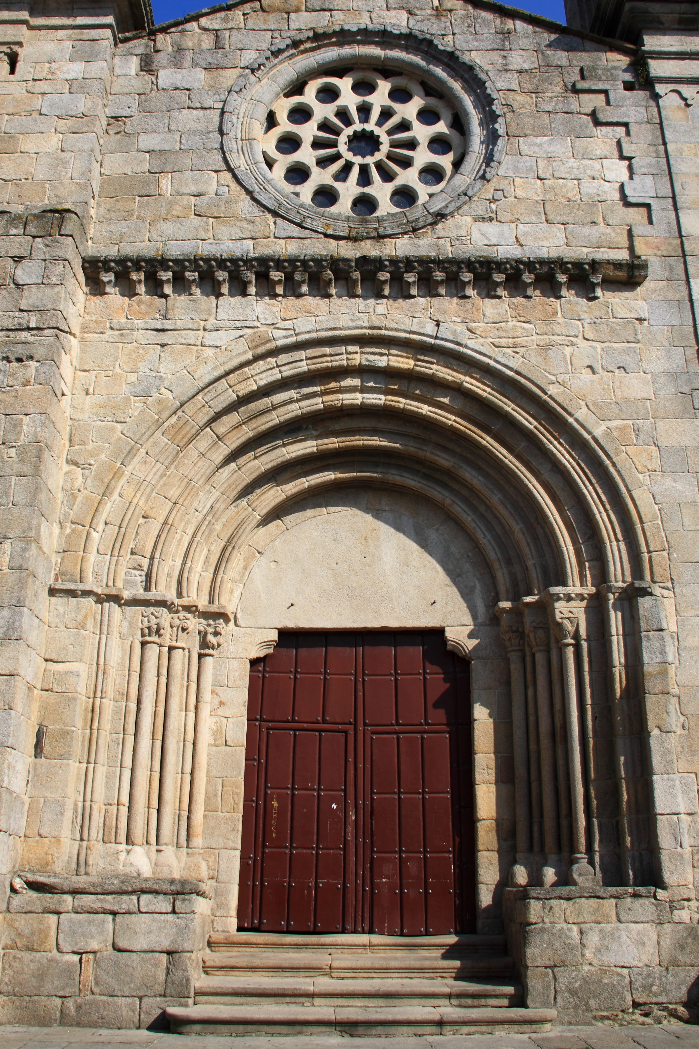 Viveiro, Iglesia de Santa Maria